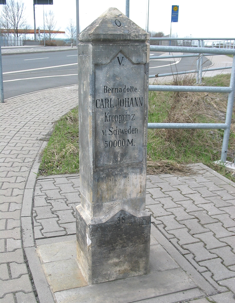 Der Apelstein Nr. 38 als Erinnerung an die Völkerschlacht bei Leipzig. Inschrift: "BernadotteCARL JOHANNKronprinzv. Schweden50000 M."